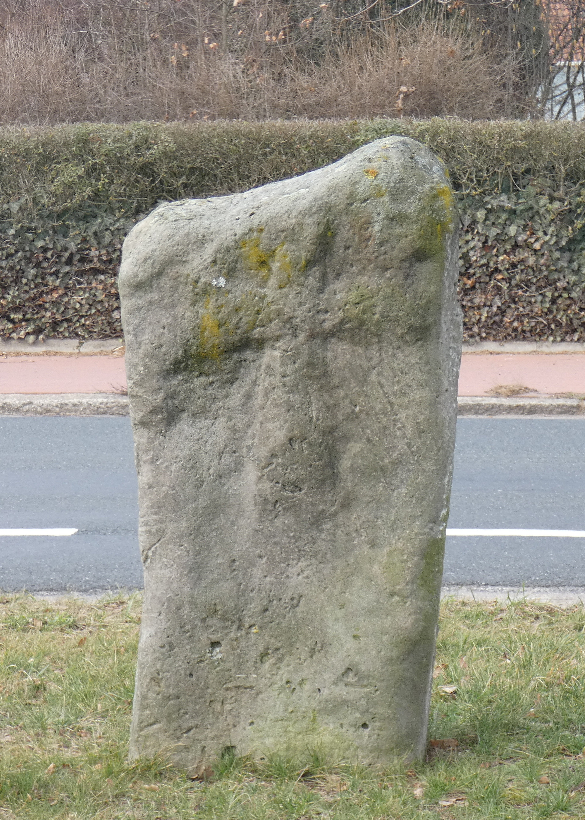 Der sogenannte Schwedenstein ist ein Kreuzstein in Northen, einem Stadtteil von Gehrden in der Region Hannover in Niedersachsen. Er ist einer der wenigen im früheren Landkreis Hannover erhaltenen Kreuzsteine und steht unter Denkmalschutz.